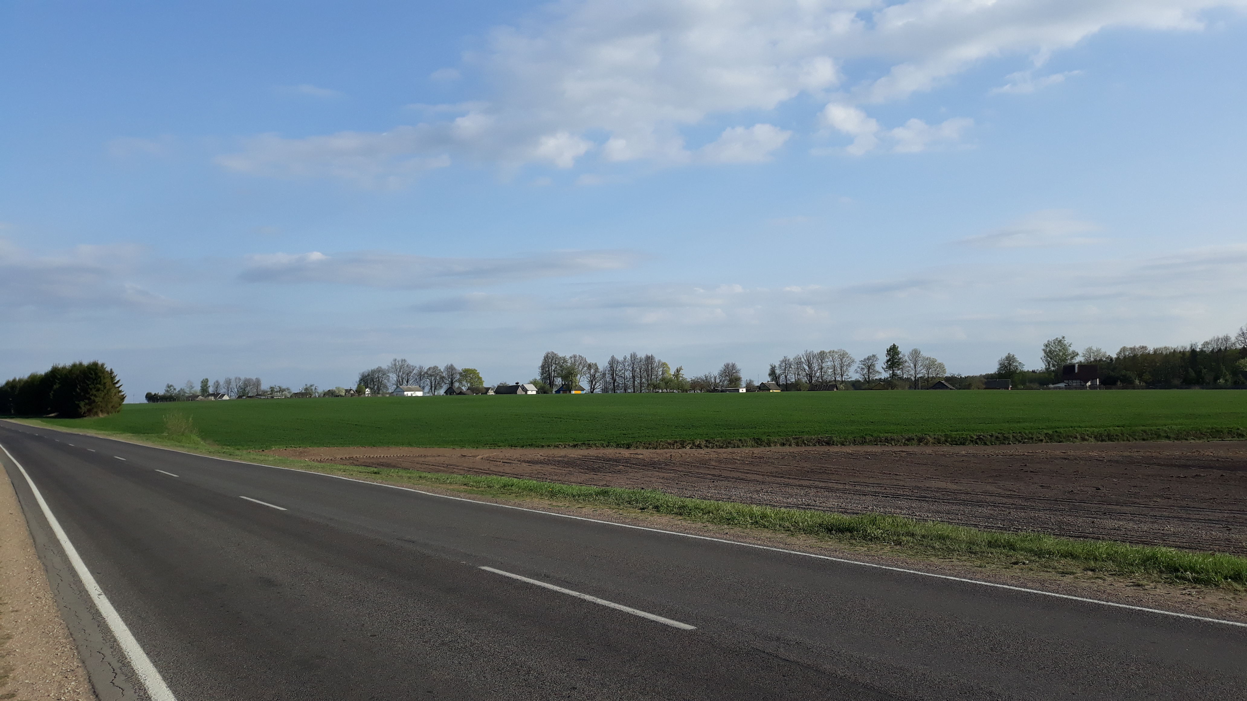 Краявід вёскі